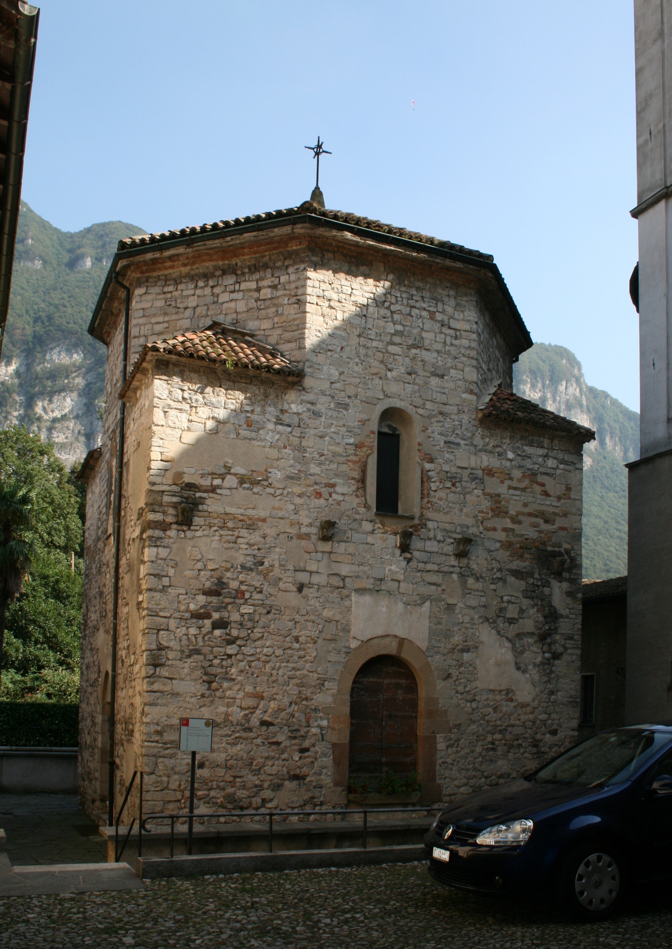 Battistero di Riva san Vitale: valutare le dimensioni dell'edificio.